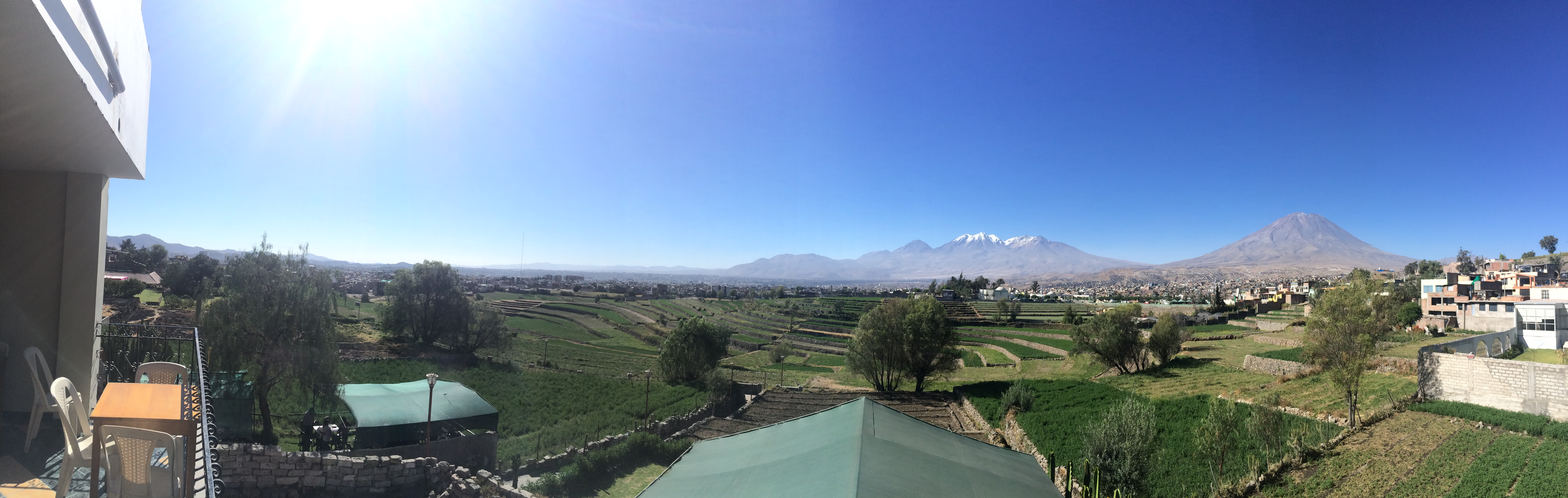 Vista de la andeneria y de la cuidad de Arequipa